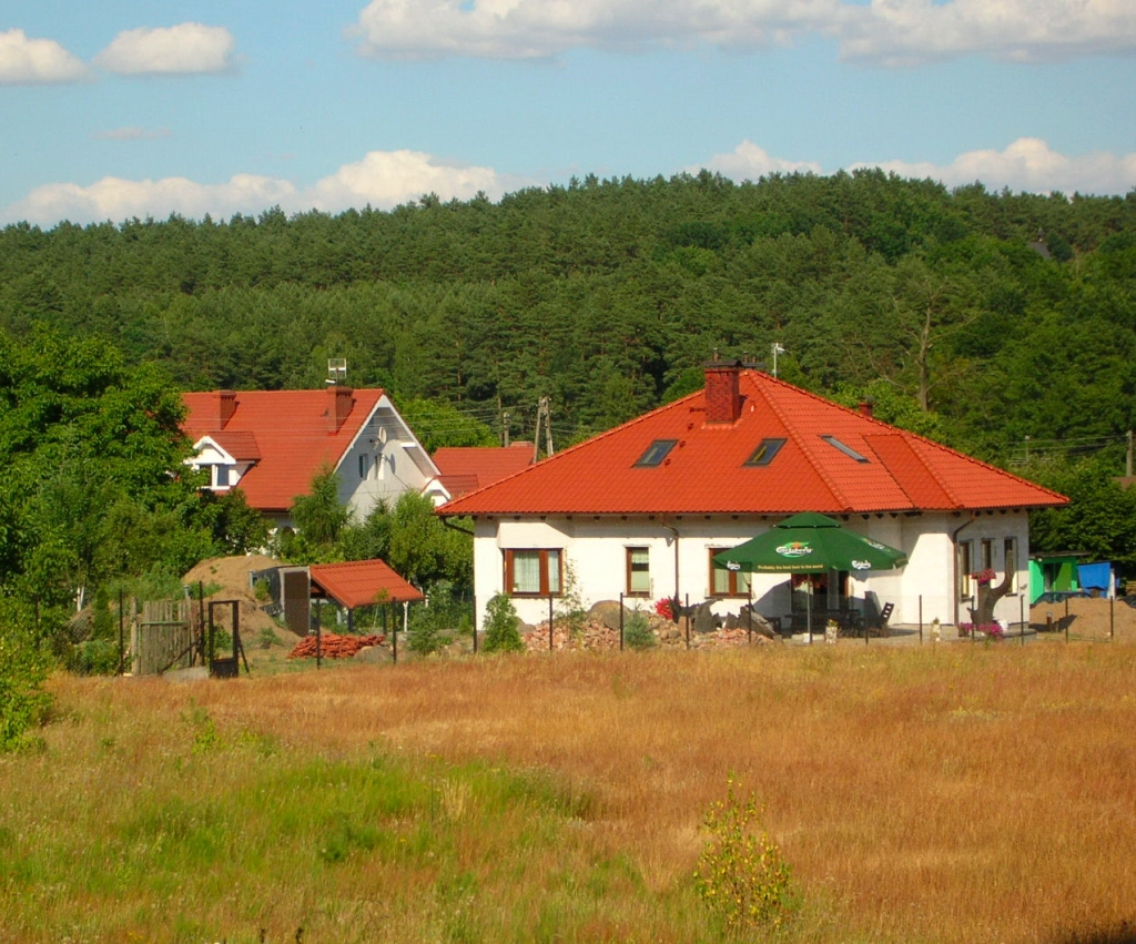 Fragment osiedla Opławiec w Bydgoszczy